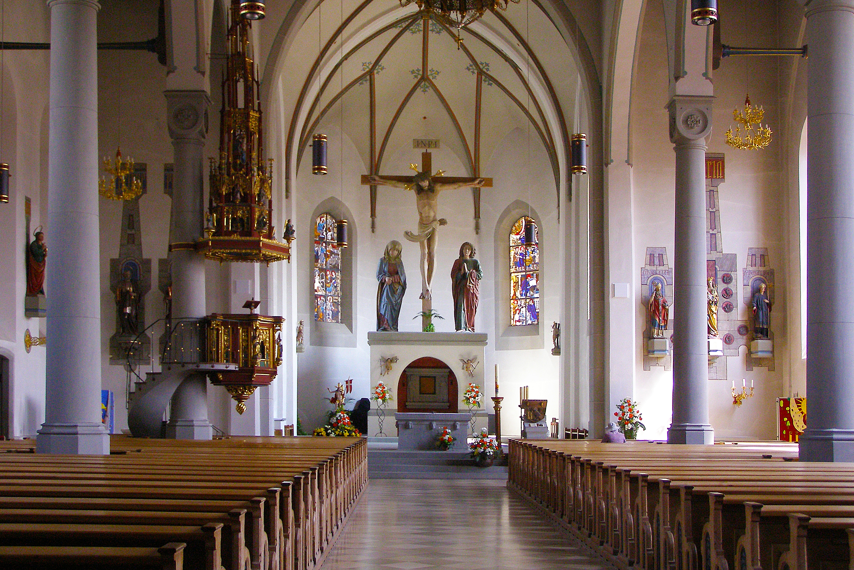 Pfarrkirche St. Peter und Paul in Oberstaufen (Innenansicht)